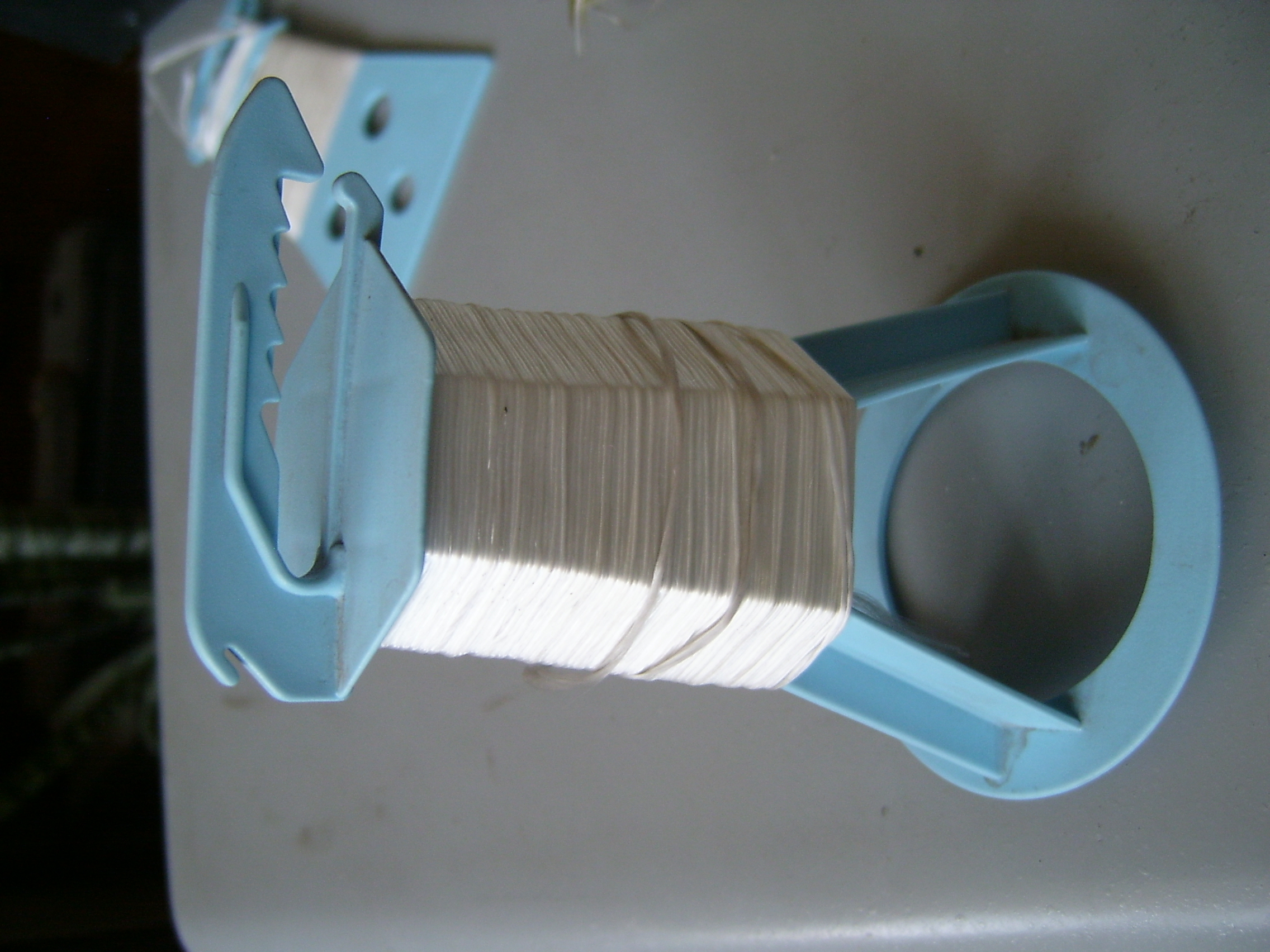 این نخ بازکن برای بازکردن ازن سوند و رادیوسوند پیوست به آن به کار برده می شده است.